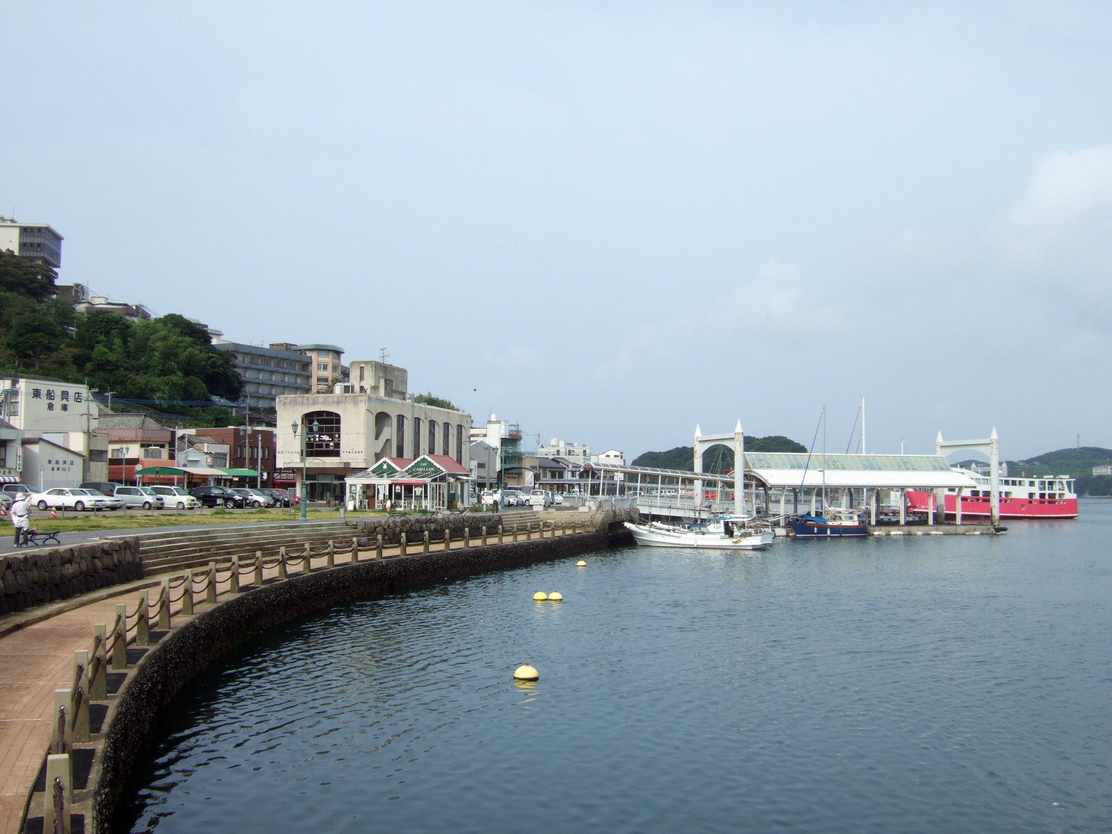 平戸港（Hirado Port）